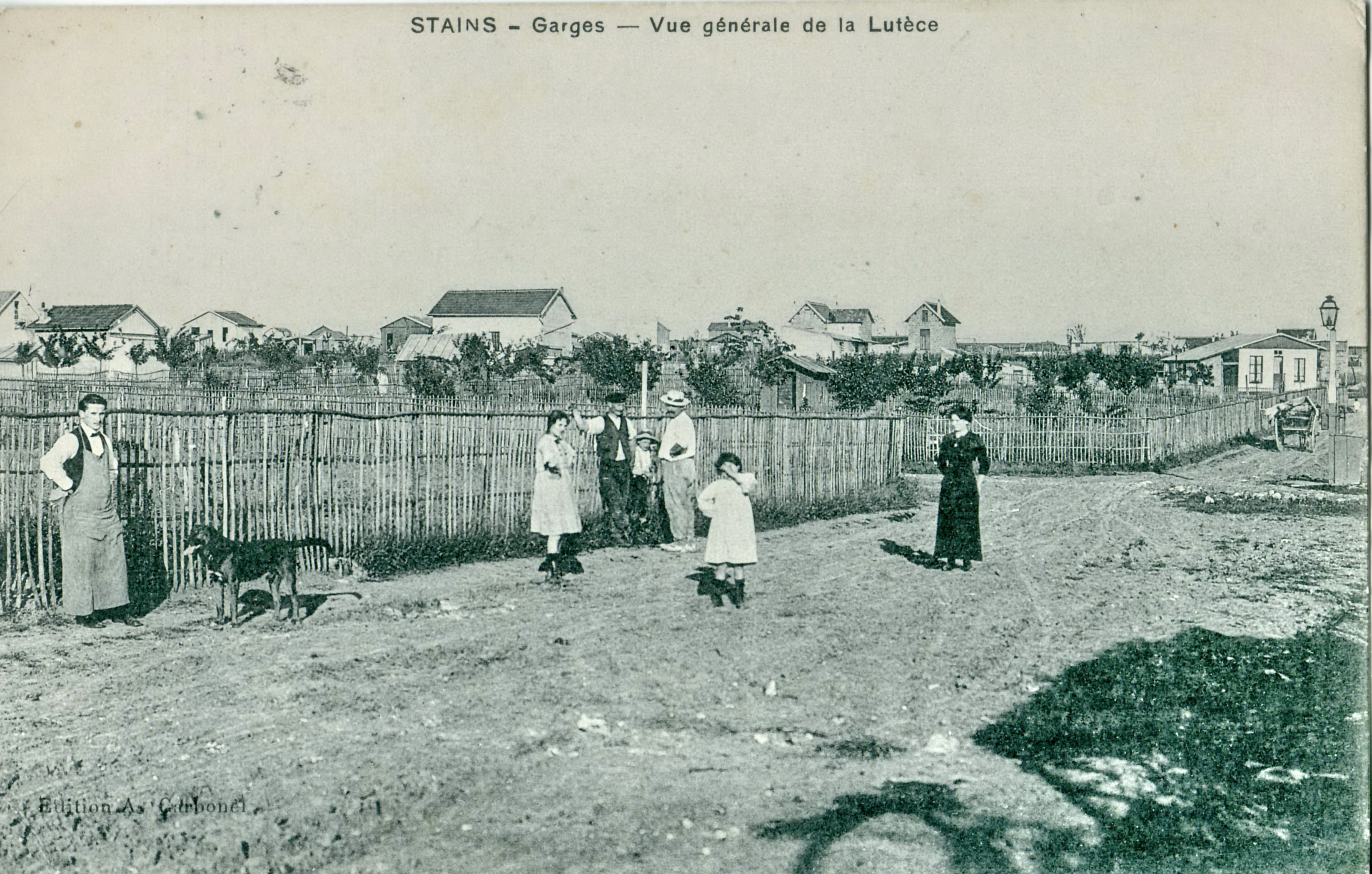 Carte postale ancienne éditée par Carbonnel STAINS - GARGES : Vue générale de la Lutèce L'expression "mal-loti" avait un sens très précis au début du XXe siècle ... : les "rues" sont des bourbiers. Un candélabre a néanmoins été posé par le lotisseur